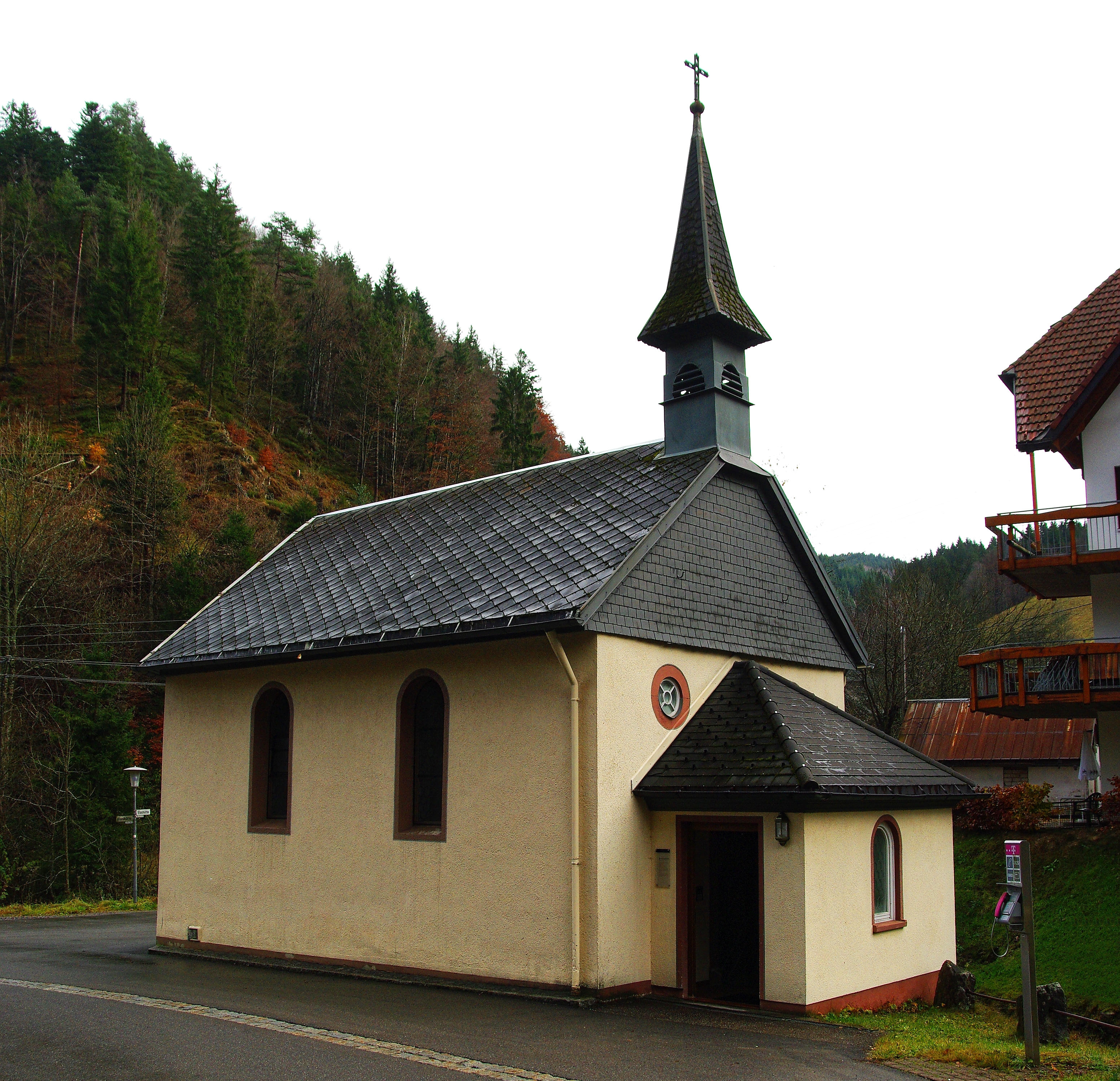 Rosenkranzkapelle oder auch Sägendobelkapelle genannt